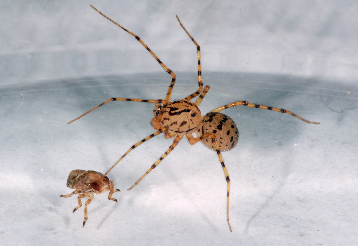 Scytodes thoracica und Zikade beim ersten Kontakt, Nied, Frankfurt/Main, Hessen, Deutschland